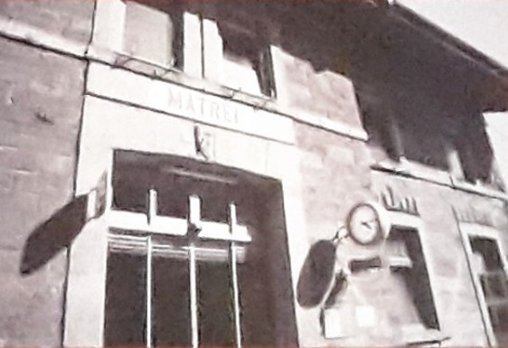 Stazione Martei